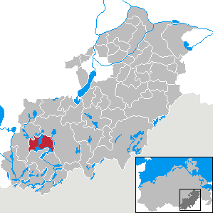 Userin in Mecklenburg-Vorpommern, Landkreis Mecklenburg-Strelitz